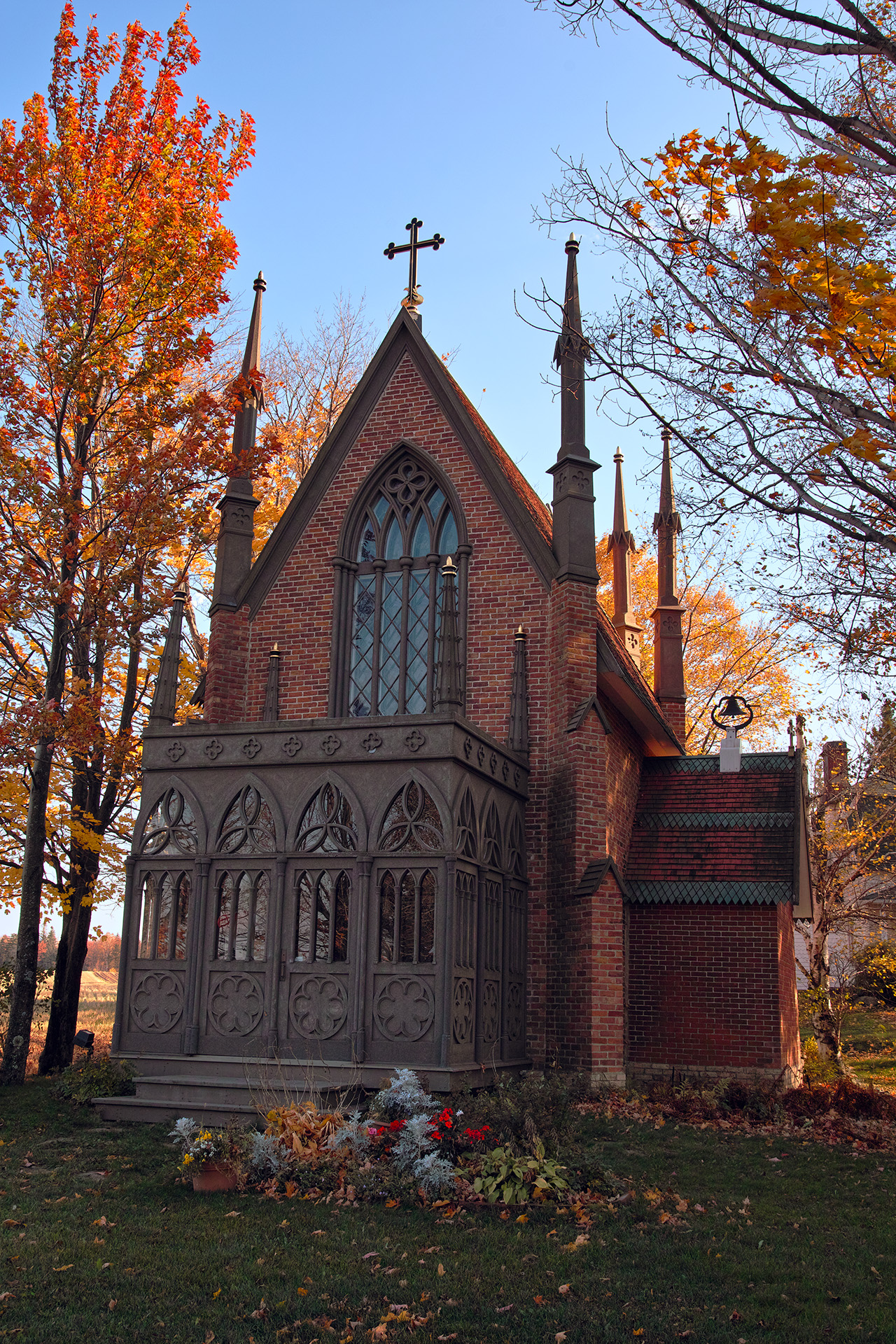 Chapelle Notre-Dame-de-Grâce, Route Marie-Victorin, Lévis (Canada). (Protection MH classé. Voir la liste des lieux patrimoniaux de la Chaudière-Appalaches pour plus de détails).